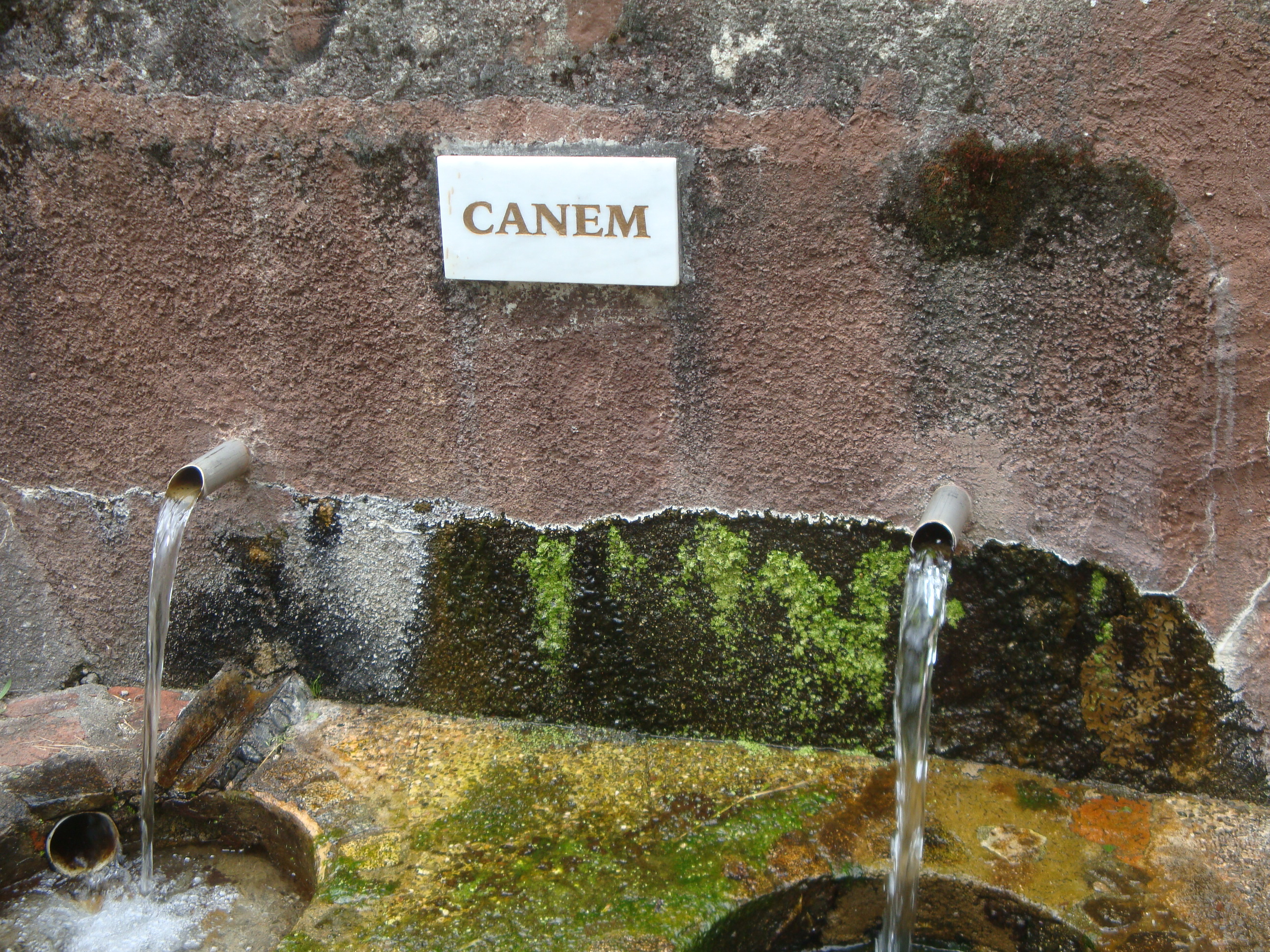 Fuente del Balneario de Caldes de Boí (Lleida)